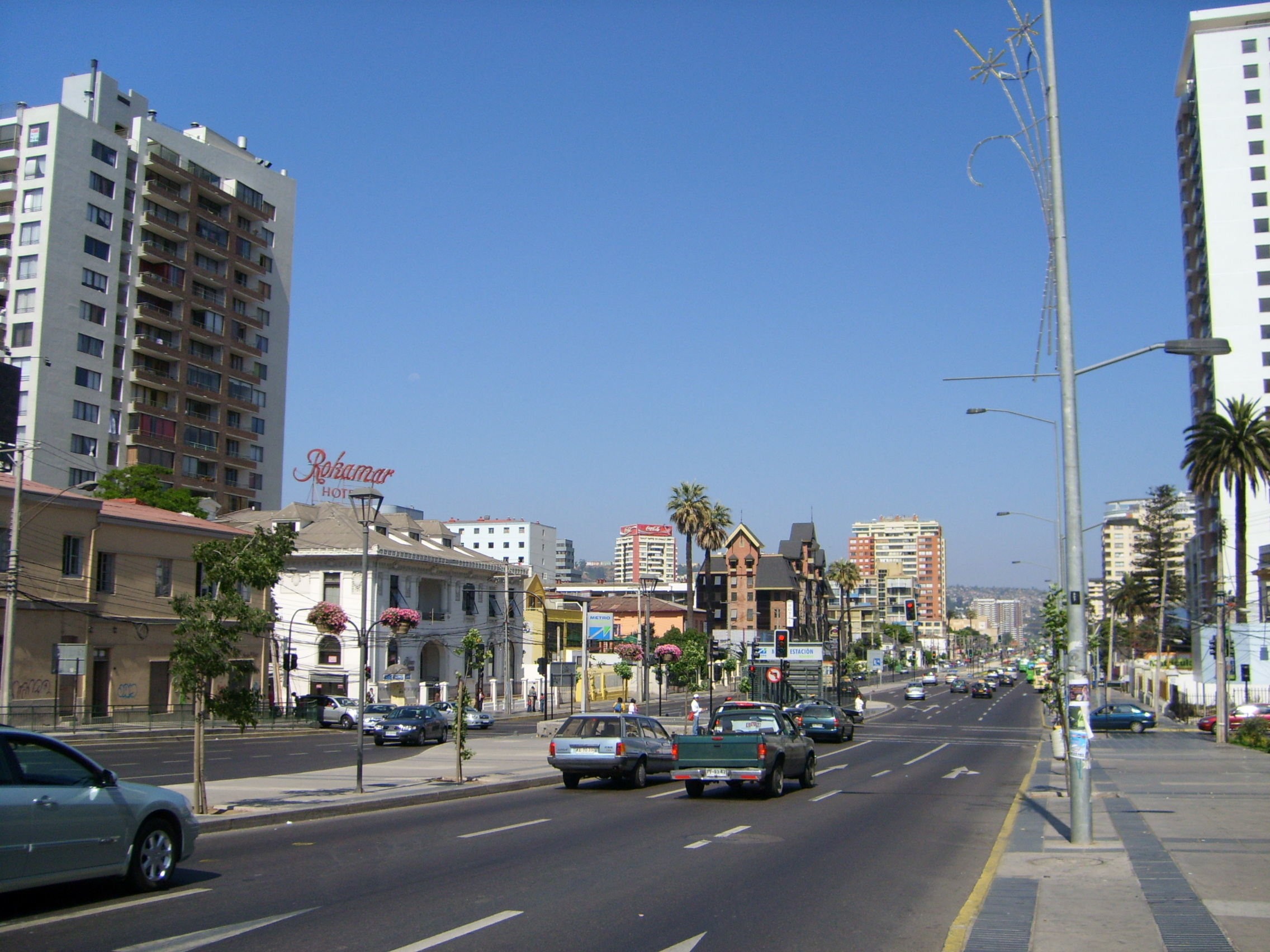 Calle Alvares, Viña del Mar